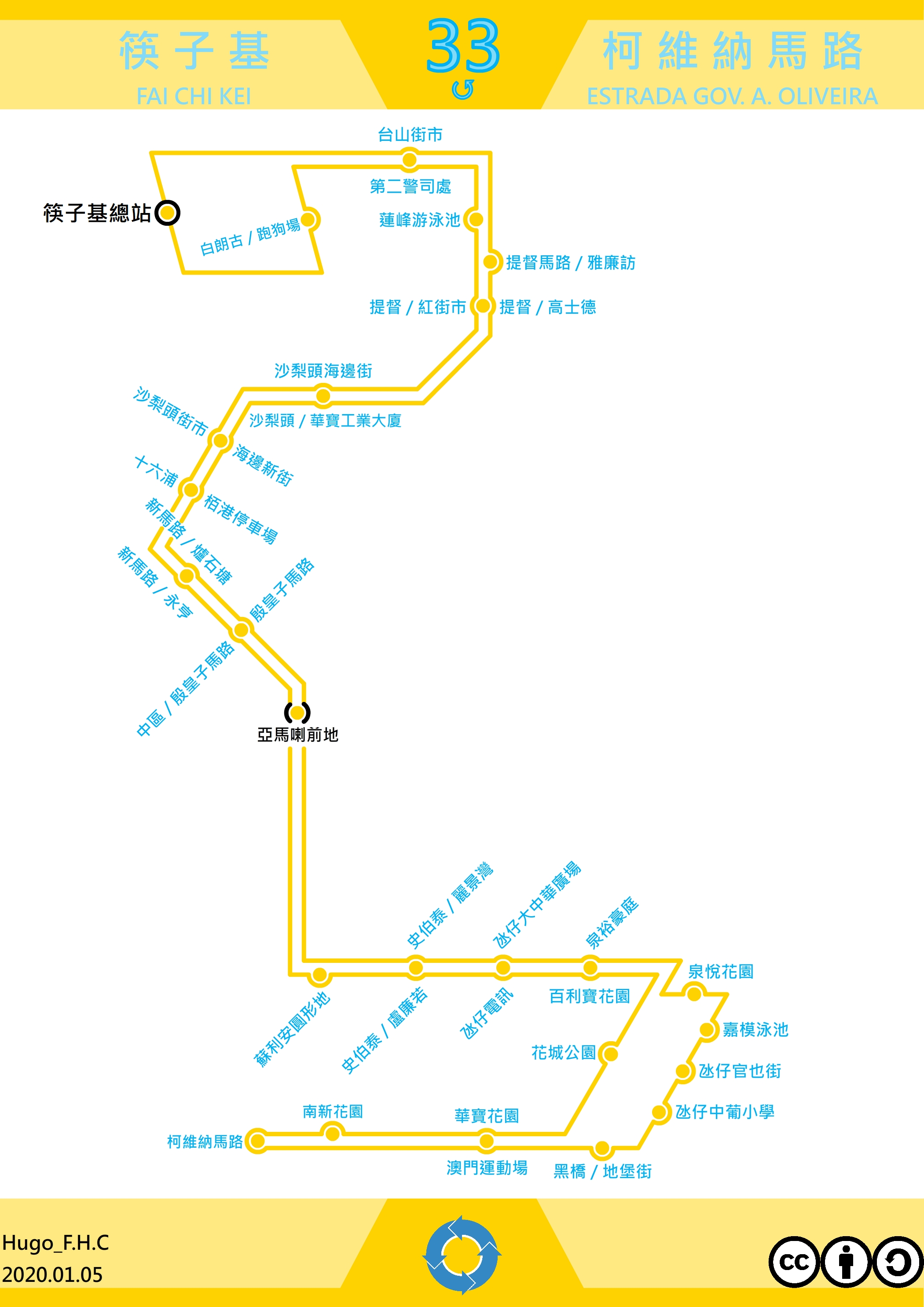 澳門巴士33路線(走線圖)